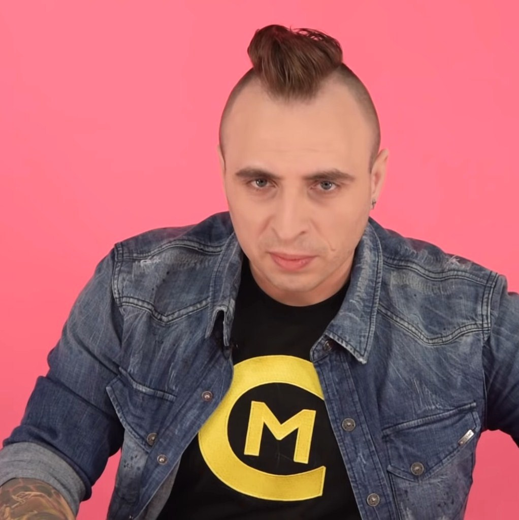 Czadoman (Paweł Dudek), wokalista.